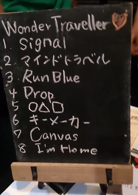 amiinaセトリボード(20150620(1))